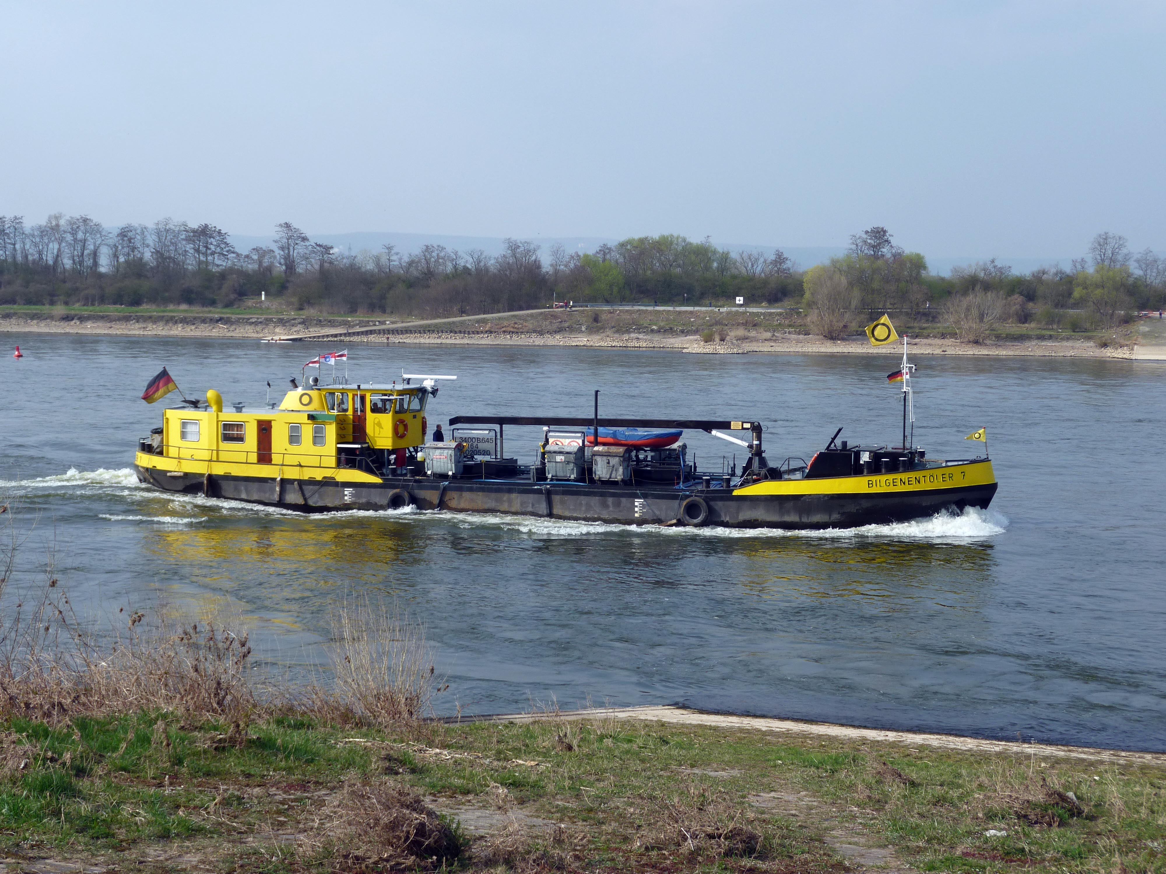 Bilgenentöler 7